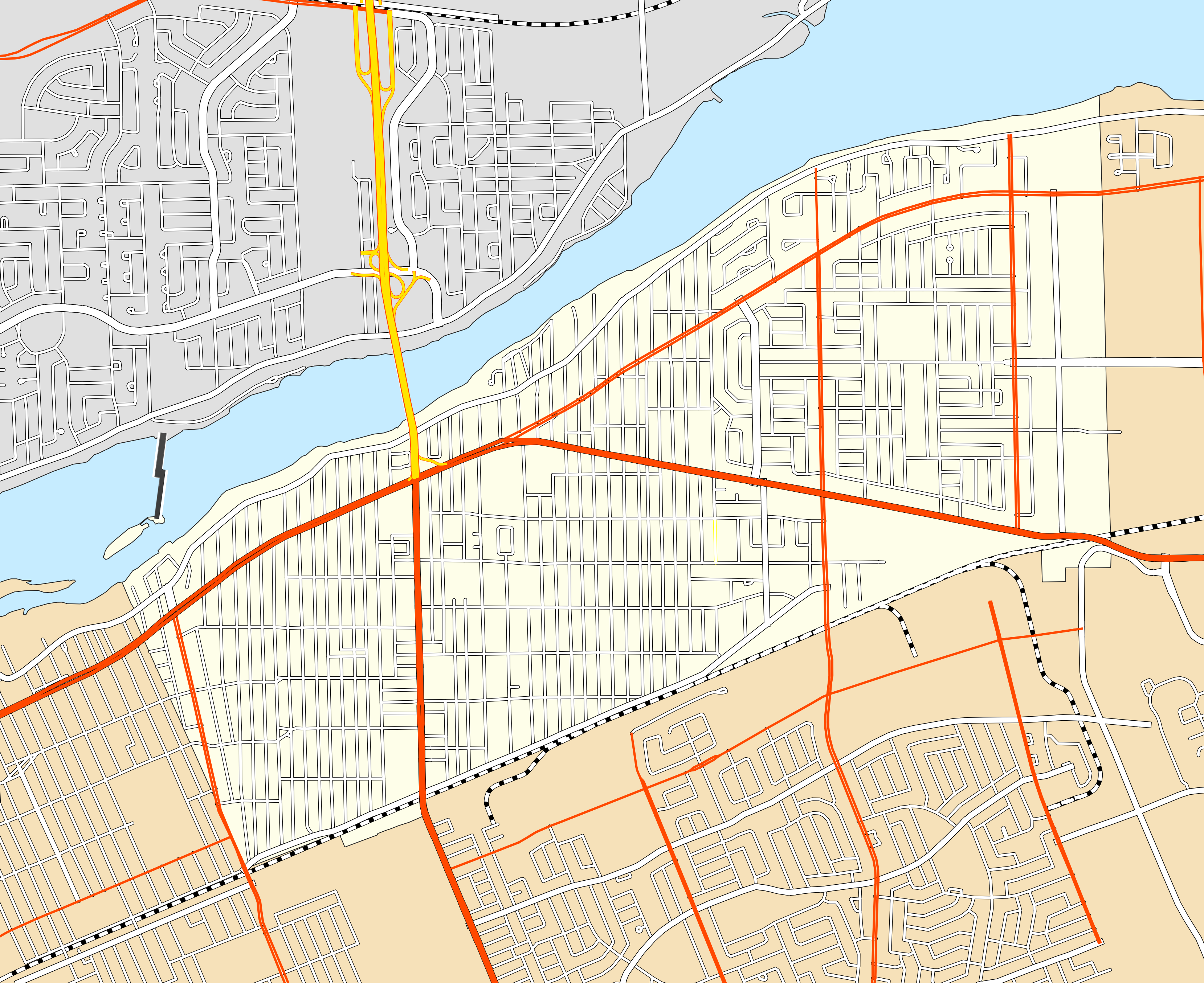 Carte du réseau routier de Montréal-Nord This map may be incomplete, and may contain errors. Don't rely solely on it for navigation.